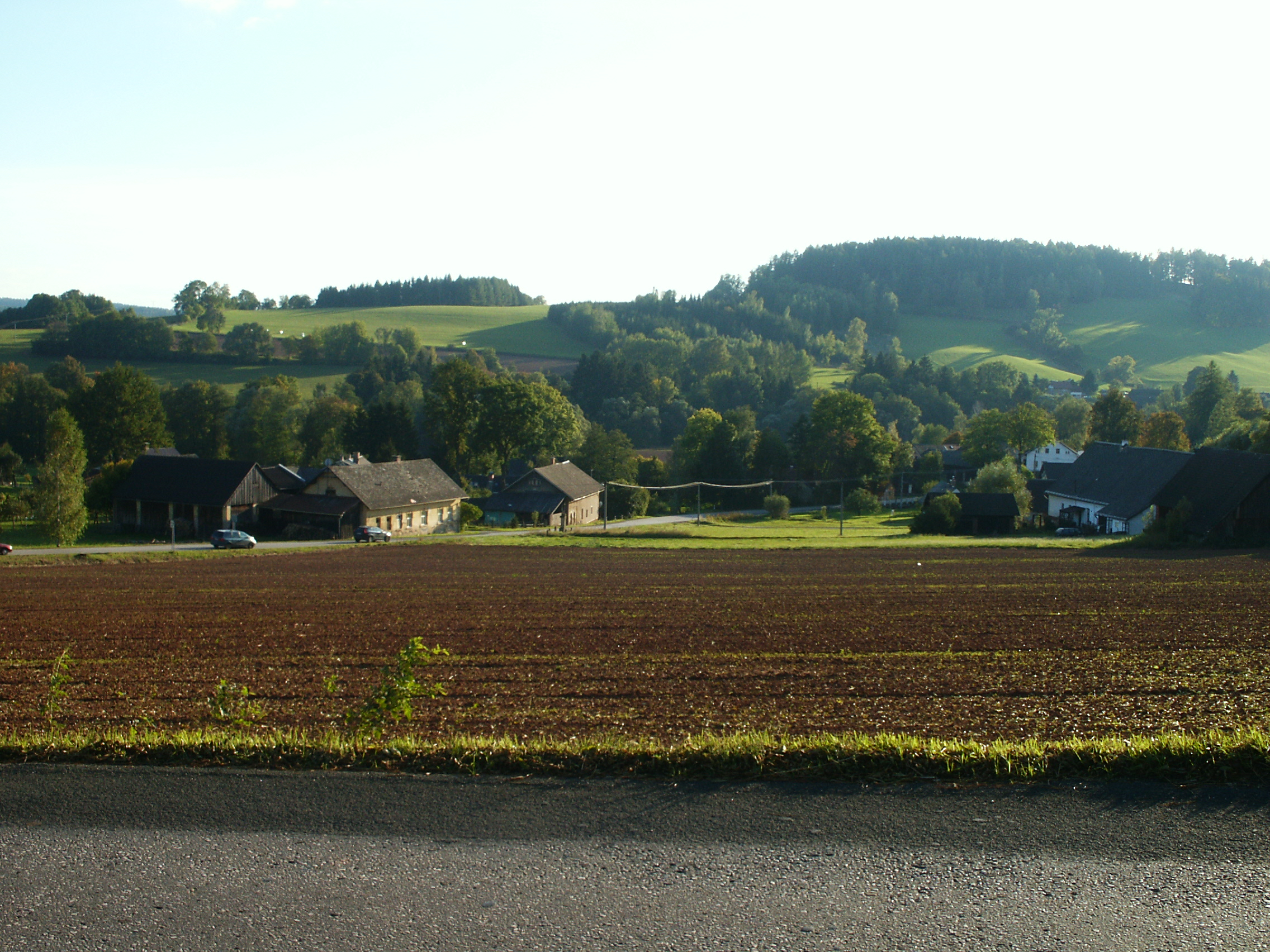 Slemeno (Dolní Kalná) - celkový pohled od severovýchodu